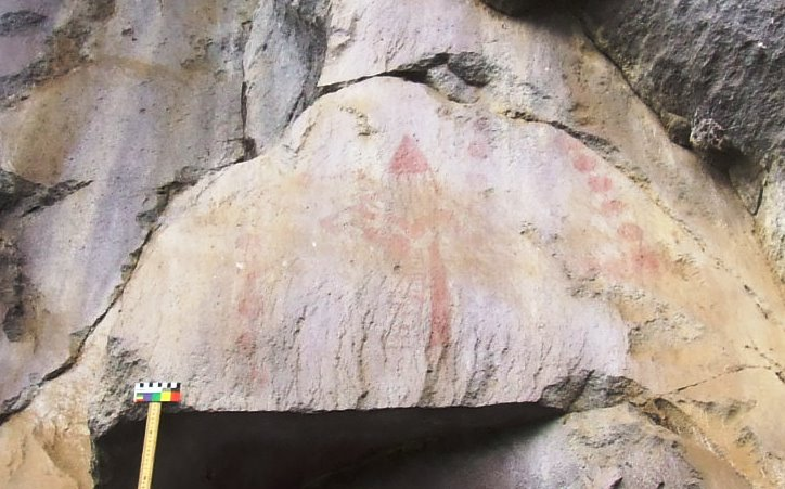 Fotografía del saliente de roca con la representación del Posclásico Tardío